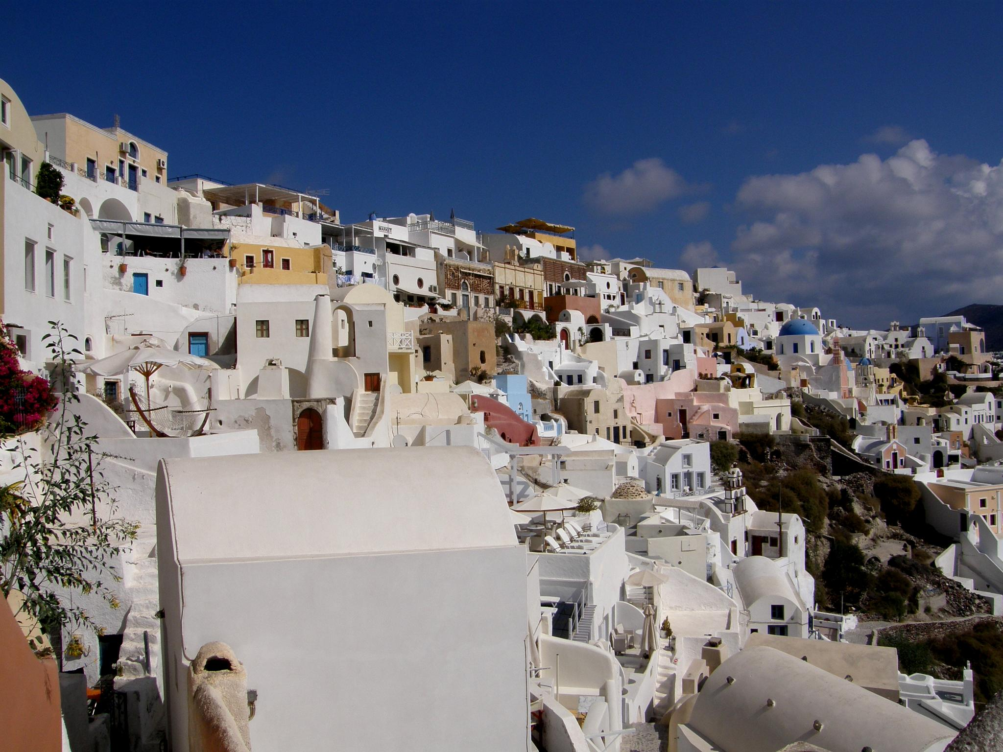 Autumn in Oia, Santorini.